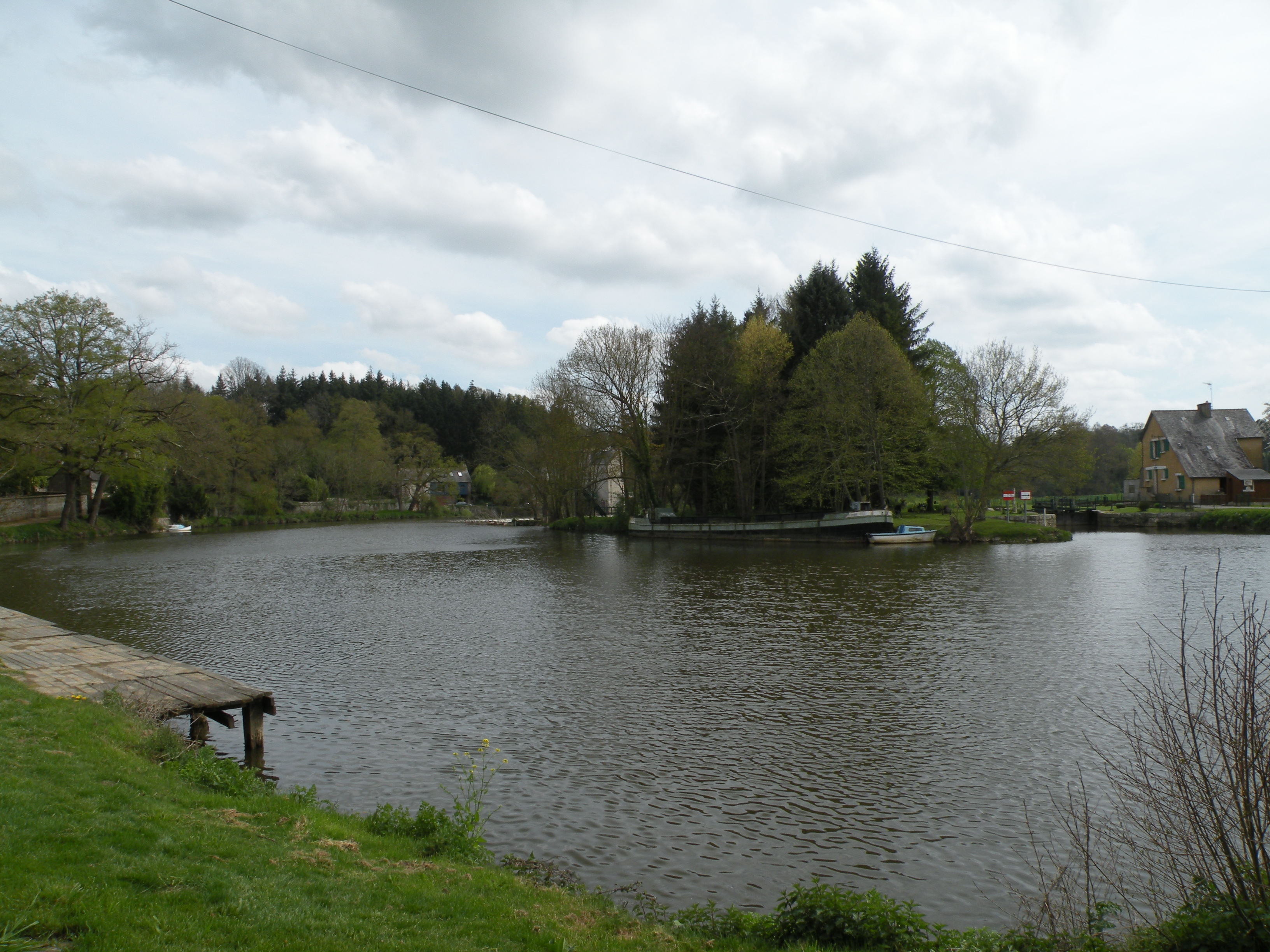 Port de la Courbe à Bourg-des-Comptes sur la Vilaine